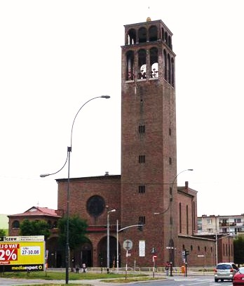 Tczew - kościół św. Józefa - widok z zewnątrz.